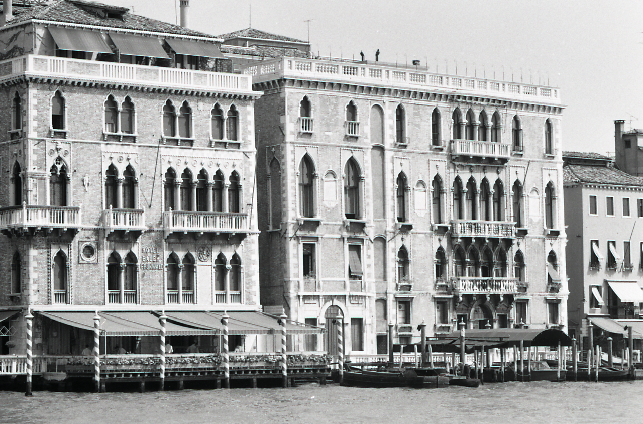 Serie fotografica : Venezia, 1969 / Paolo Monti. - Strisce: 7, Fotogrammi complessivi: 37 : Negativo b/n, gelatina bromuro d'argento/ pellicola ; 35 mm. - ((I fotogrammi hanno una doppia numerazione. . - Sul portanegativi: Nikon Agfa 21. - All'interno del portanegativi Monti specifica alcuni soggetti. - Fonte: Agenda di Paolo Monti: Monti - Agenda 1969 (1969), presso Archivio Paolo Monti